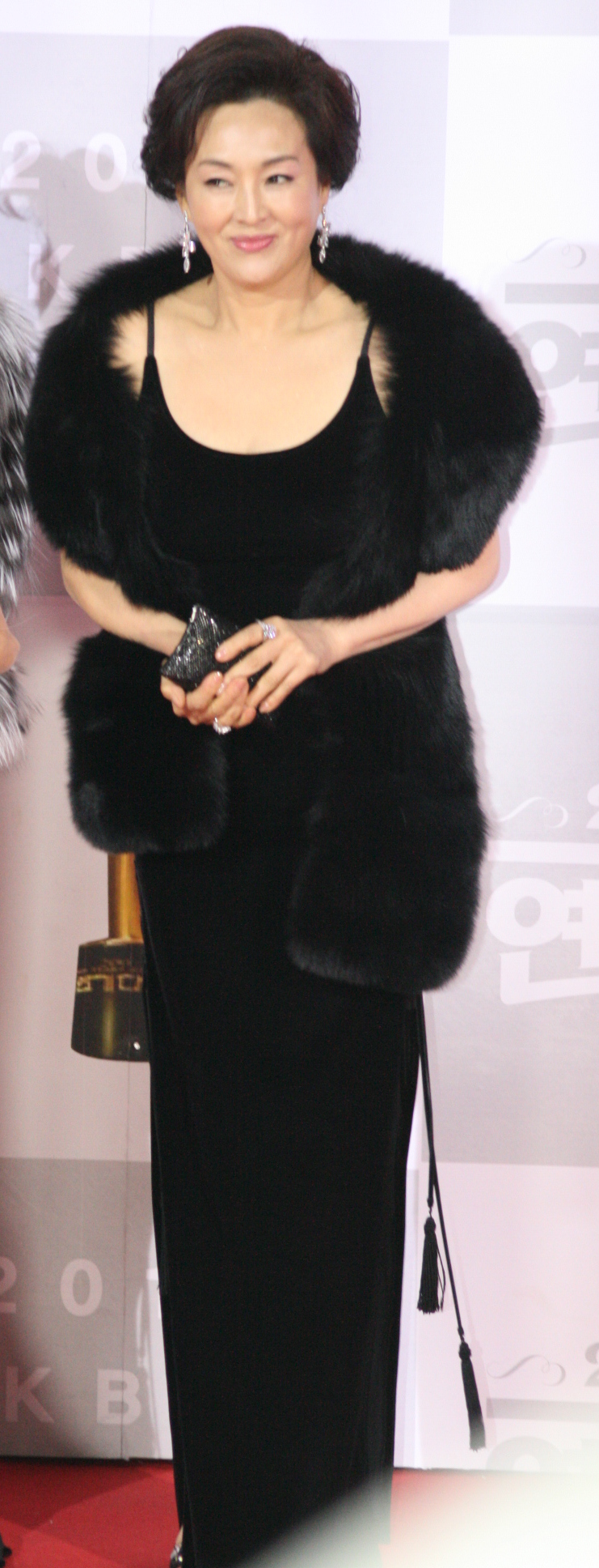 2010 KBS 연기대상